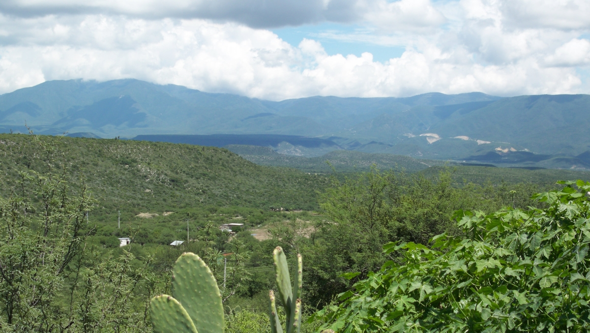 La ubicación esta justo al filo de donde termina la meseta y empieza un relieve rocoso de cerros y lomas que se pierden en declive hasta al pie de las montañas de la Sierra Madre Oriental